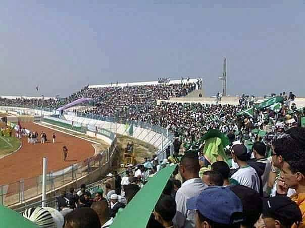 Stade gabésien en derby